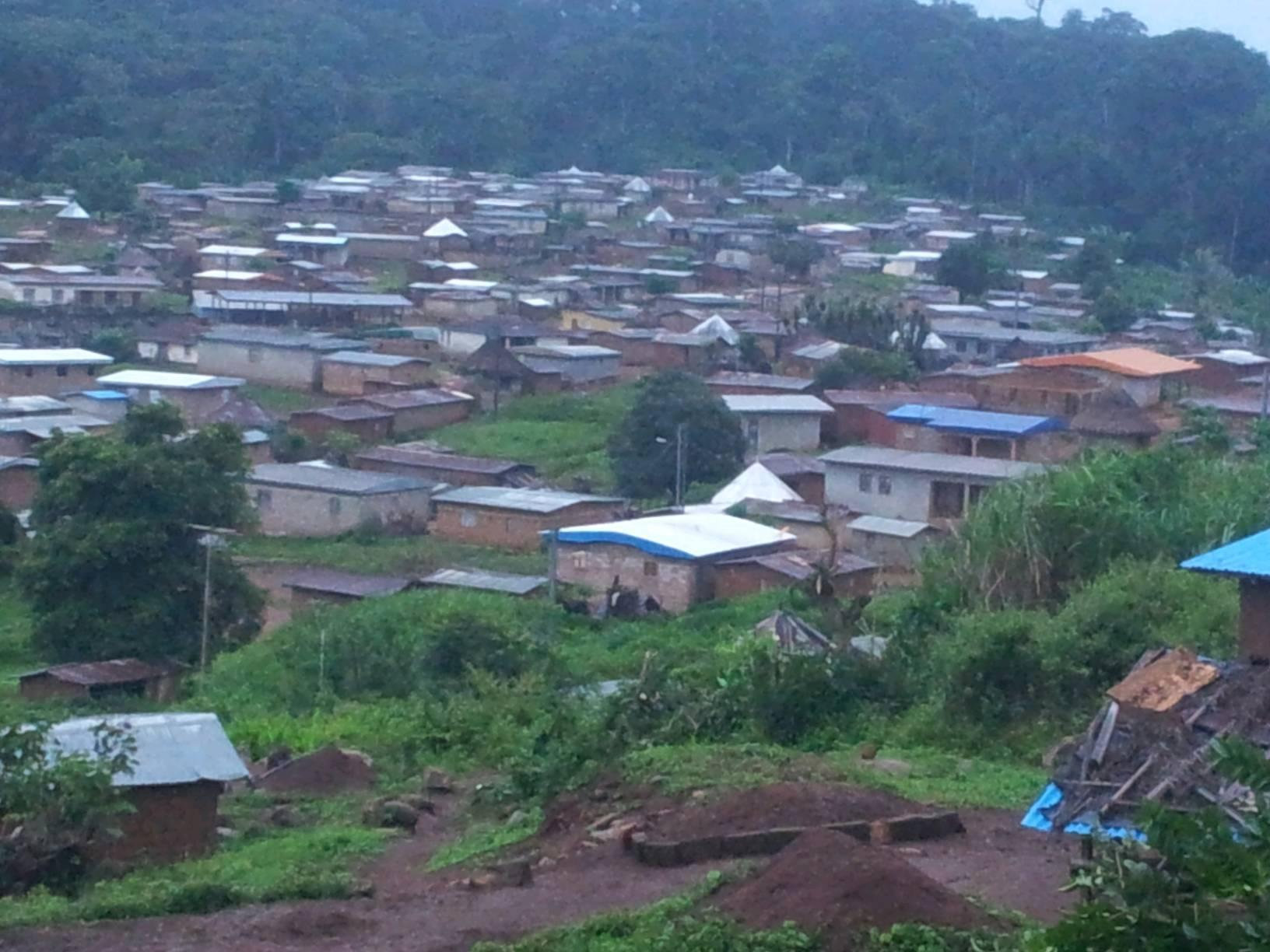 Le village de Gan Gan est un gros village situé à environ 5 km de Biankouma qui, comme la ville de Man, se situe dans une cuvette encerclée de montagnes. Gan est chef-lieu de canton, c'est-à-dire qu'il commande le Gansè (canton GAN). Les Diomandé, dont l'ancien ministre de feu le président Félix Houphouët-Boigny, Loua Diomandé, y sont traditionnellement les chefs de canton.